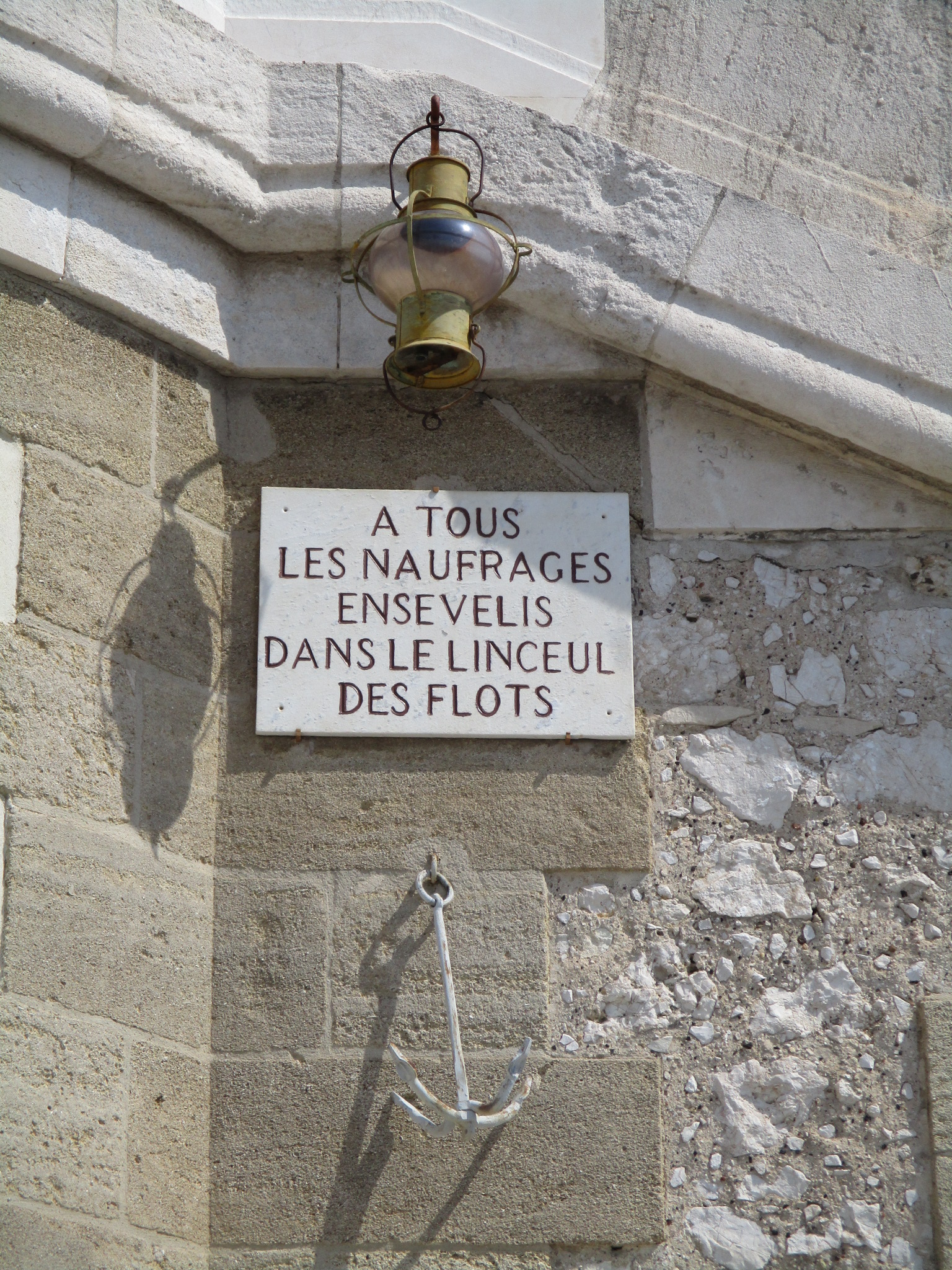 Parvis de la basilique Notre-Dame de la Garde